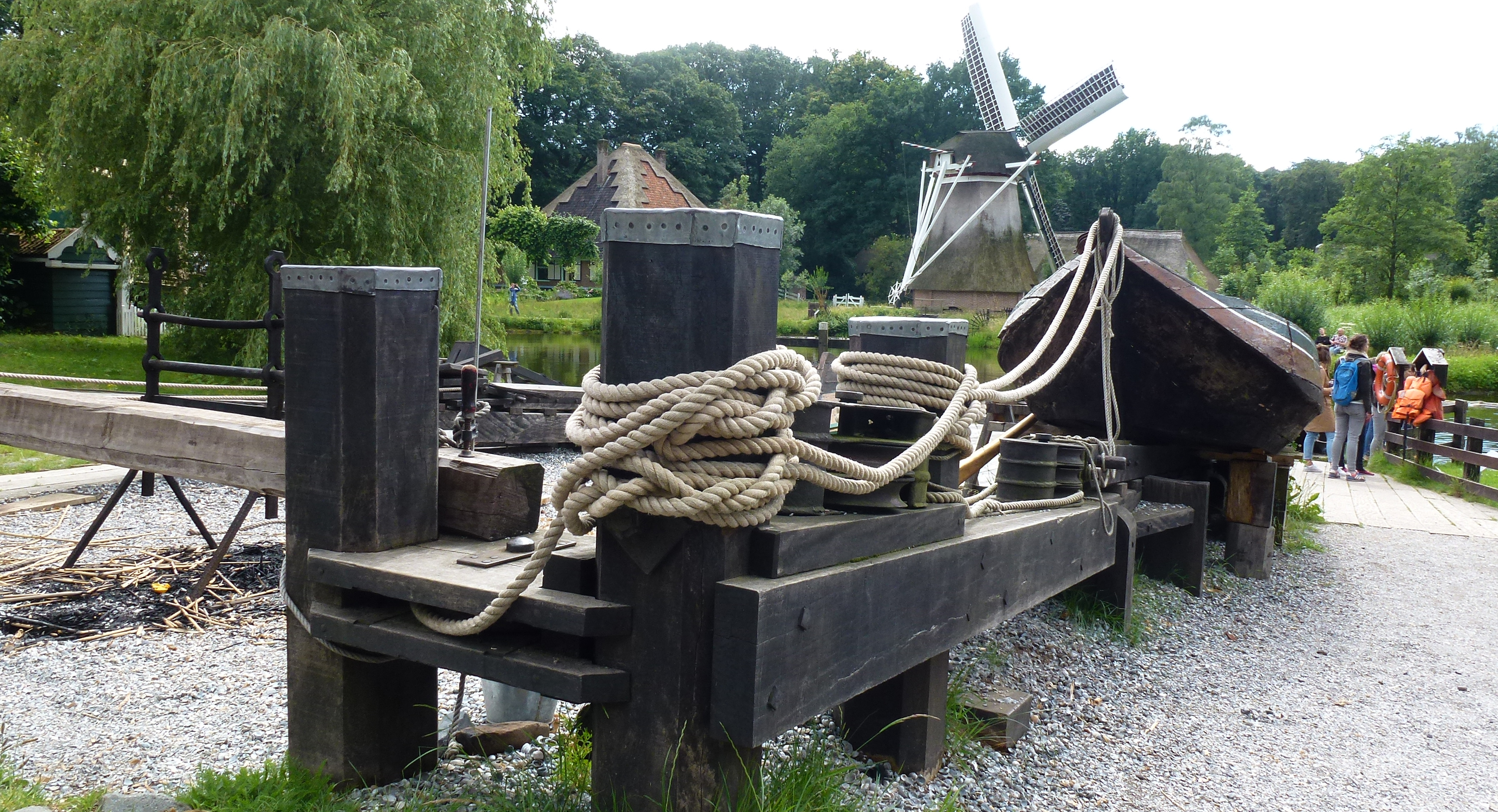 Scheepshelling, type langshelling en reparatiehelling met trekinstallatie. Fotolocatie: Nederlands Openluchtmuseum in Arnhem